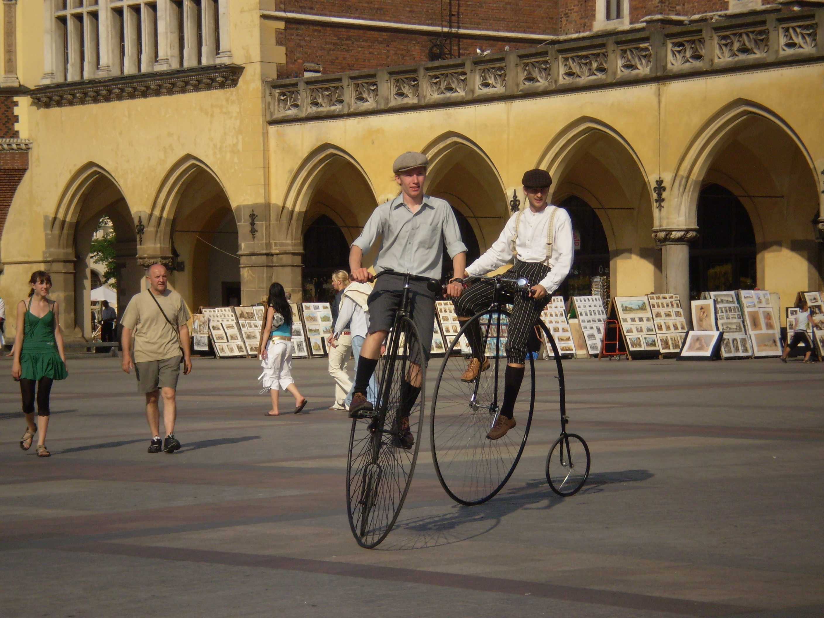 Market Square in Kraków, Poland.